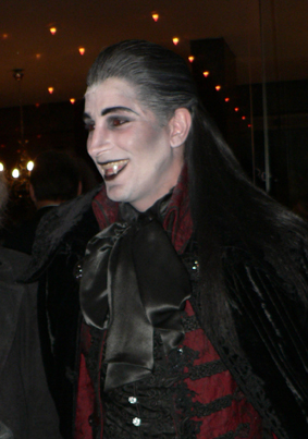 Bot Gábor mint von Krolock a Vámpírok bálján (Magyar Színház)